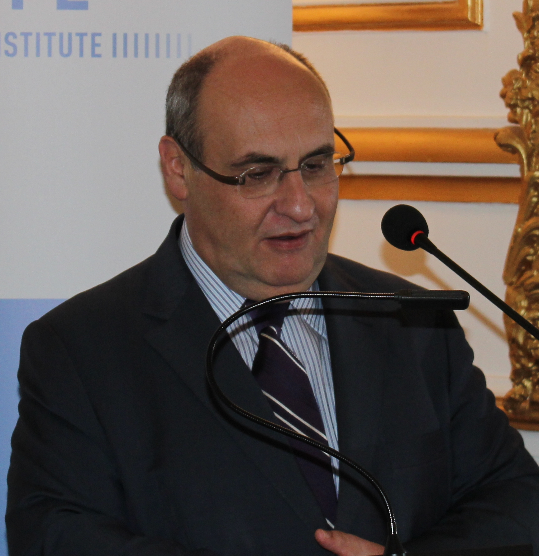 António Vitorino (2015)